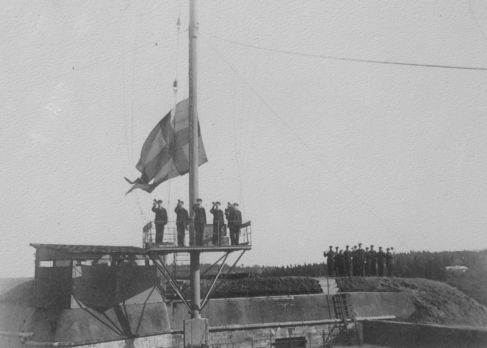 Flaggan hissas på övre verket på Oskar-Fredriksborgs fästning